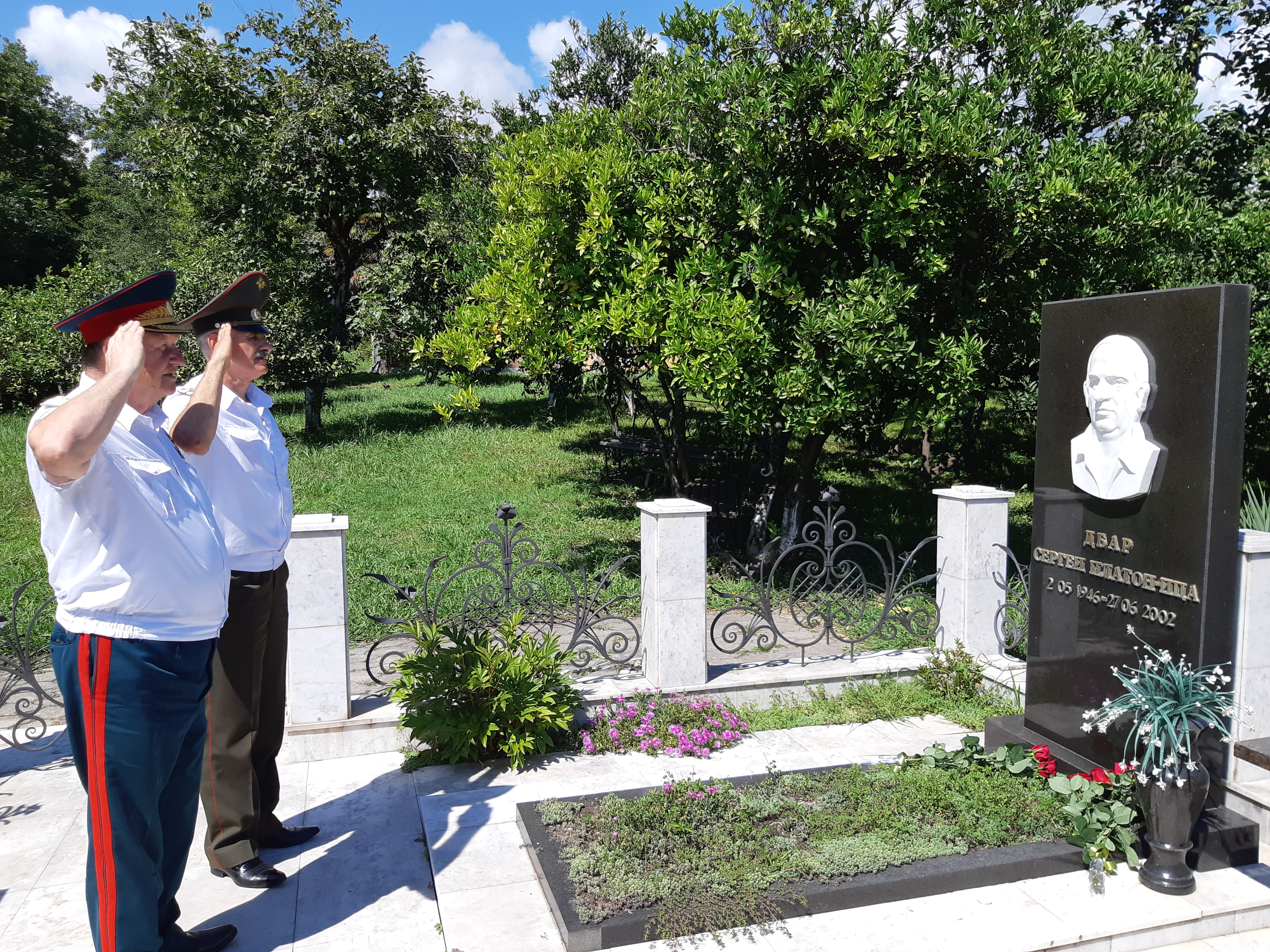 Надгробный памятник Дбар, Сергей Платонович в Мгудзырхуа Гудаутского района Абхазии.2018.